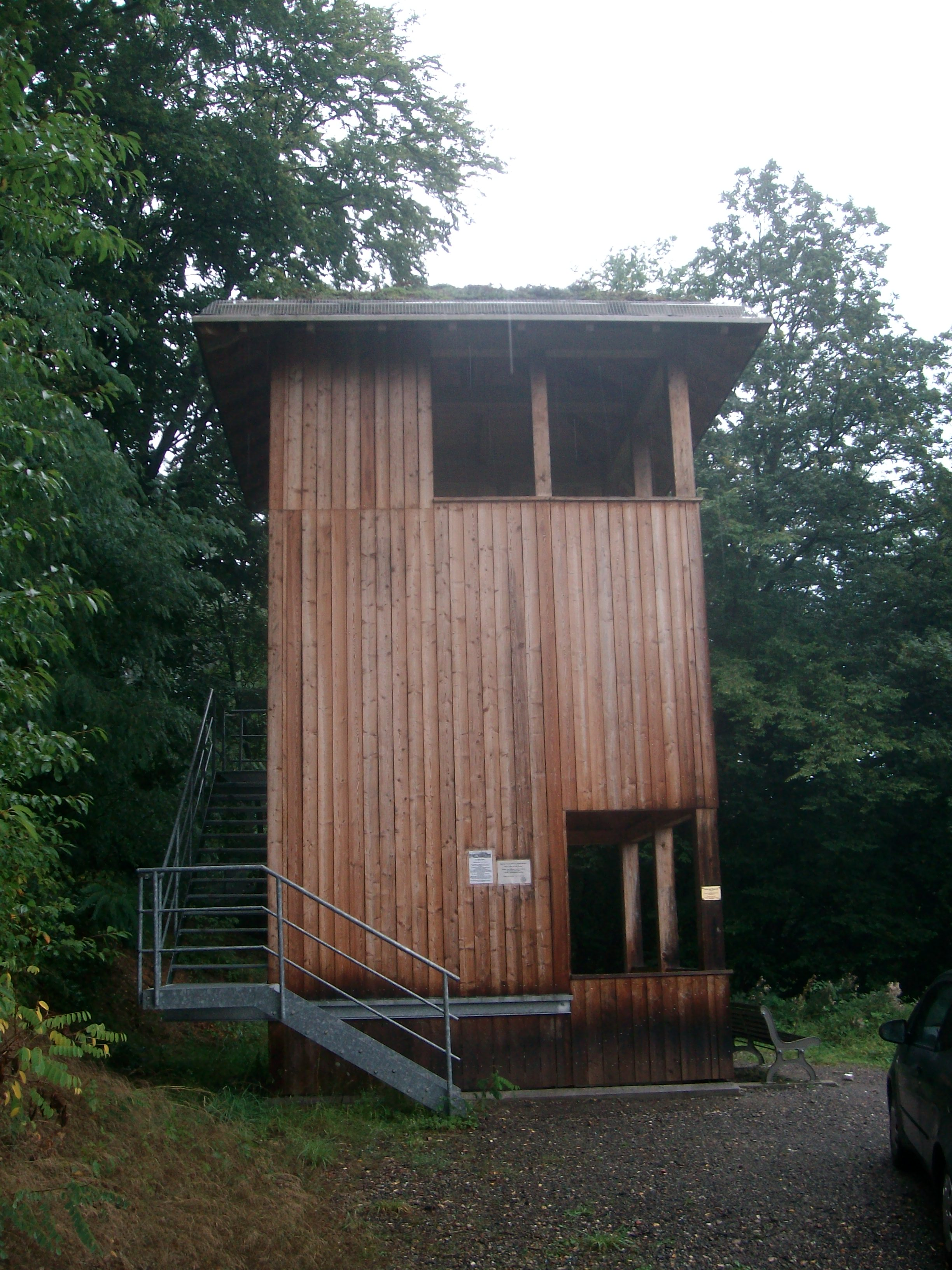 Turm am Ringwall Alteburg